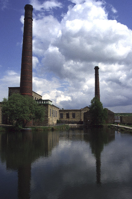 Queen Street Mill, Harle Syke